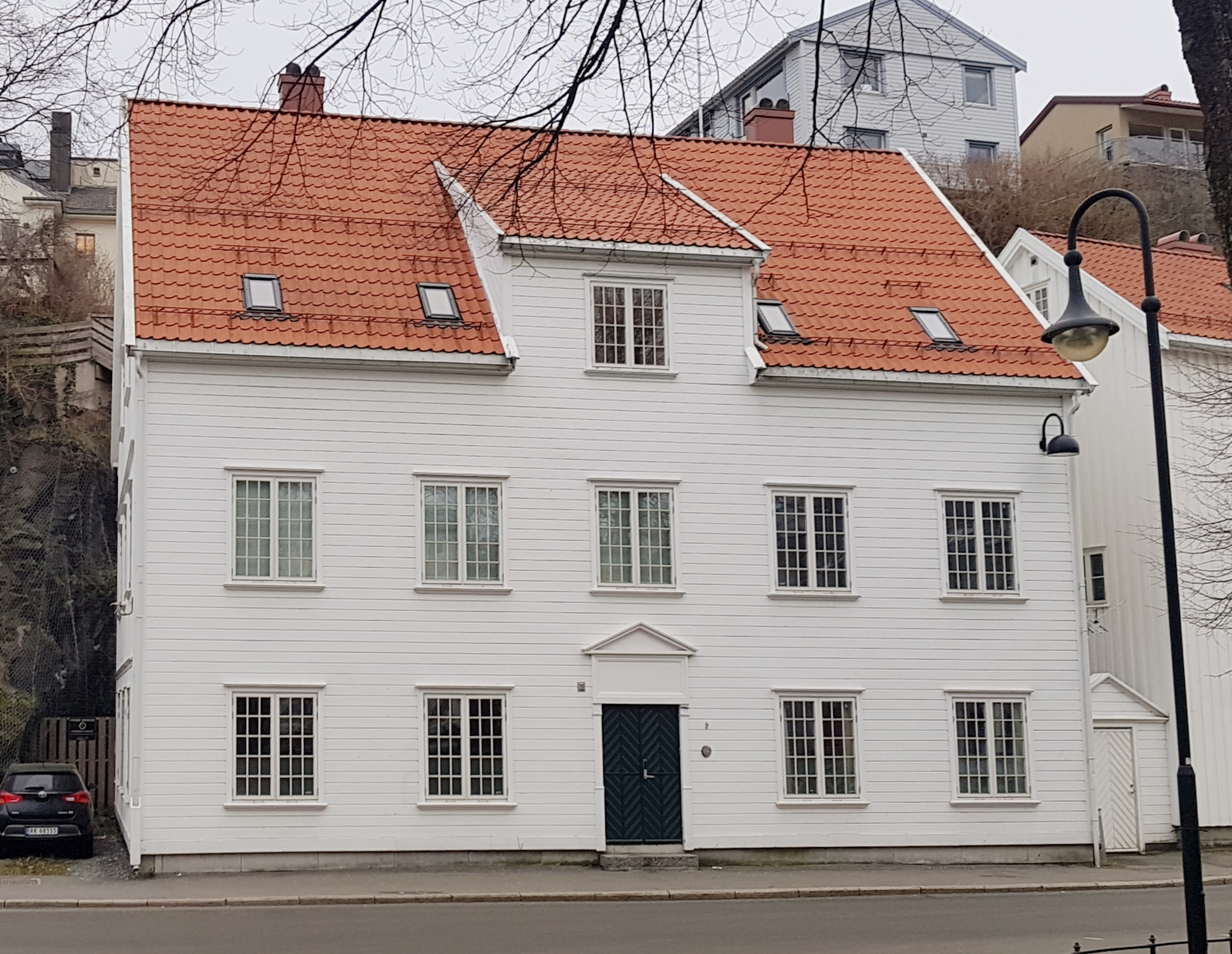 Gjerløws Minde, leilighetsbygg i Arendal, bygget som utvendig kopi etter Arendals første hospital